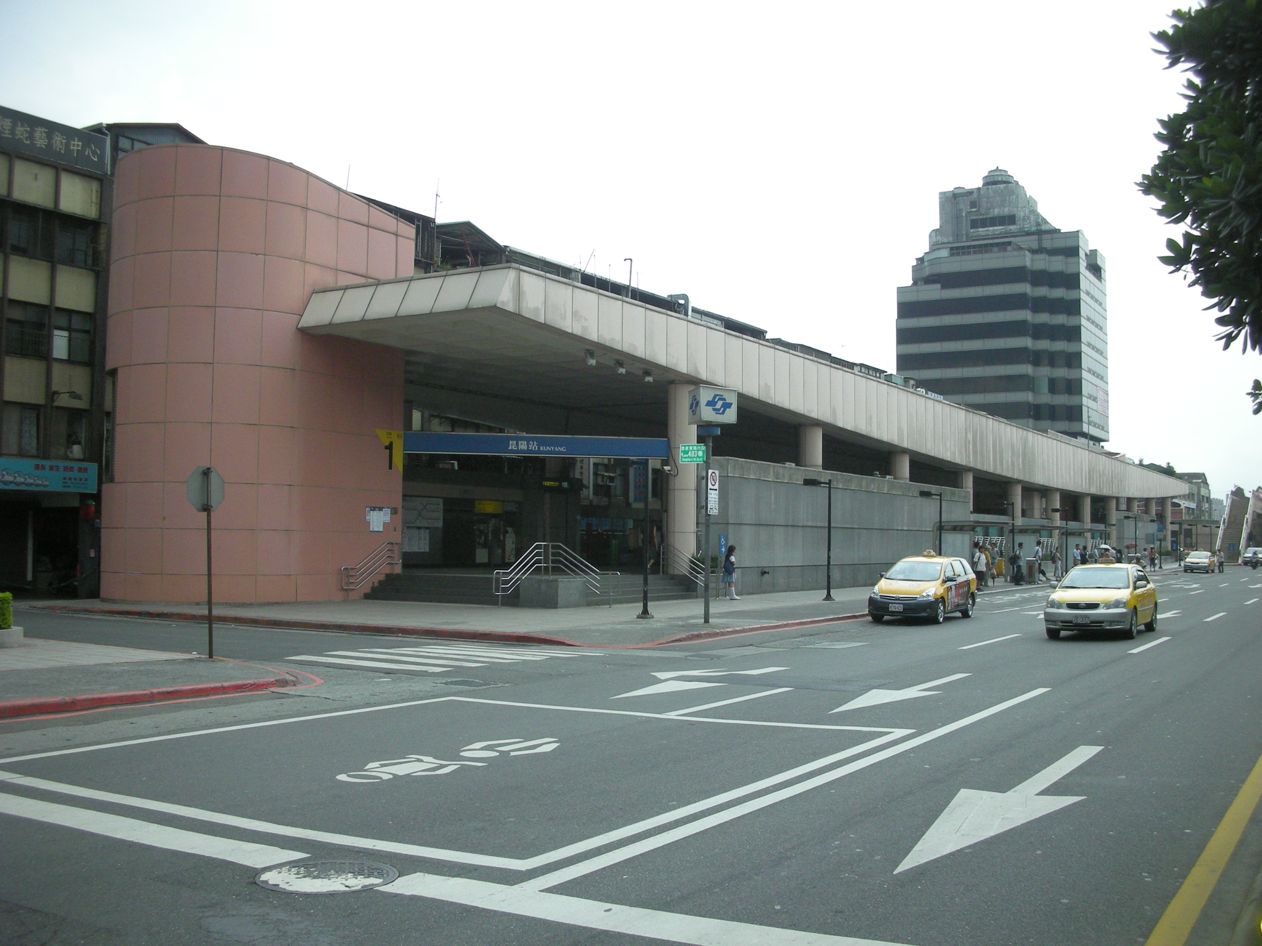 捷運昆陽站